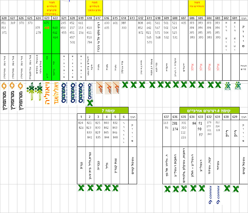 תרשים רציפים של התחנה המרכזית בתל אביב